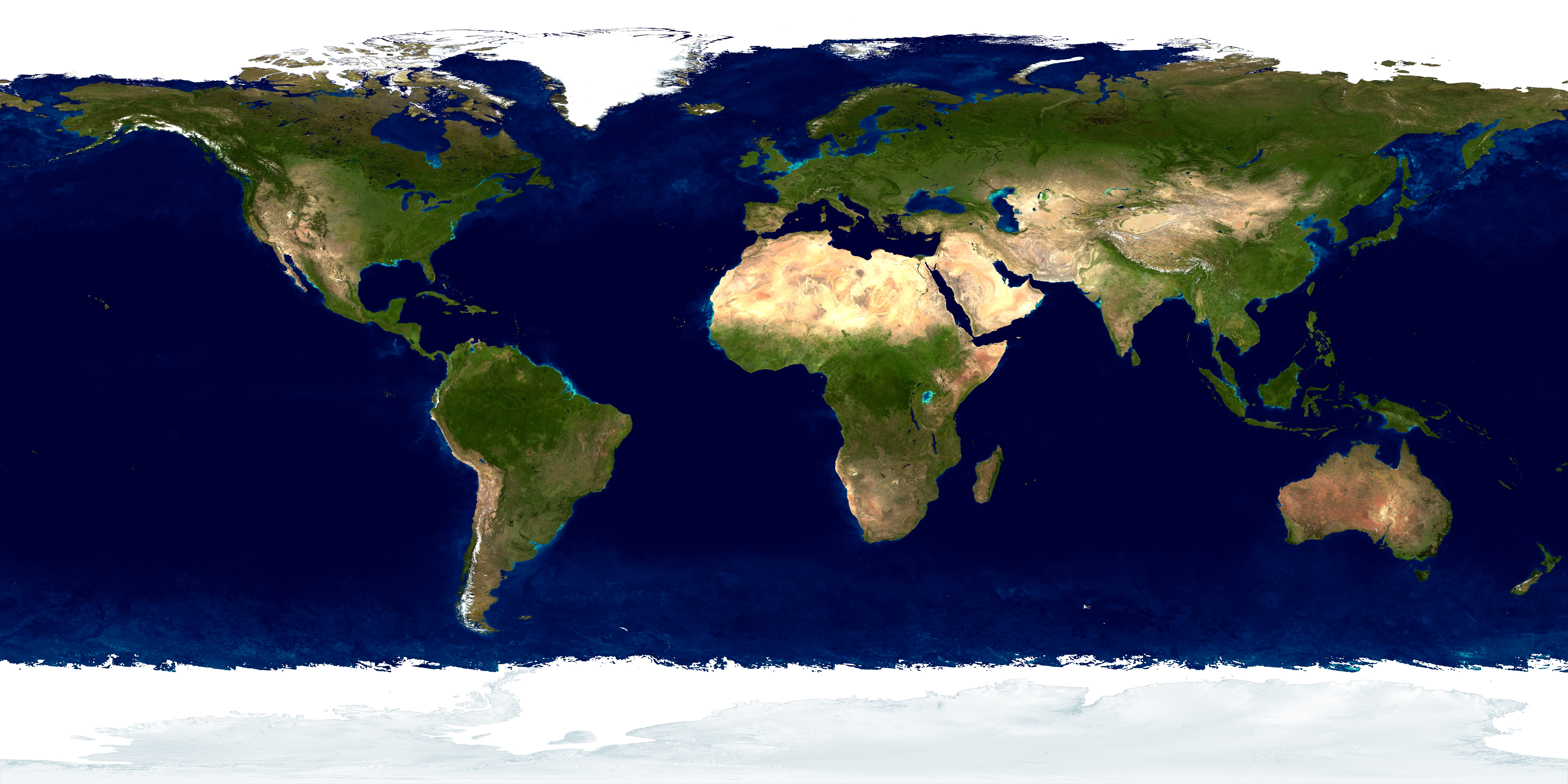 Die Erde wolkenlos, jedoch mit Eisregionen